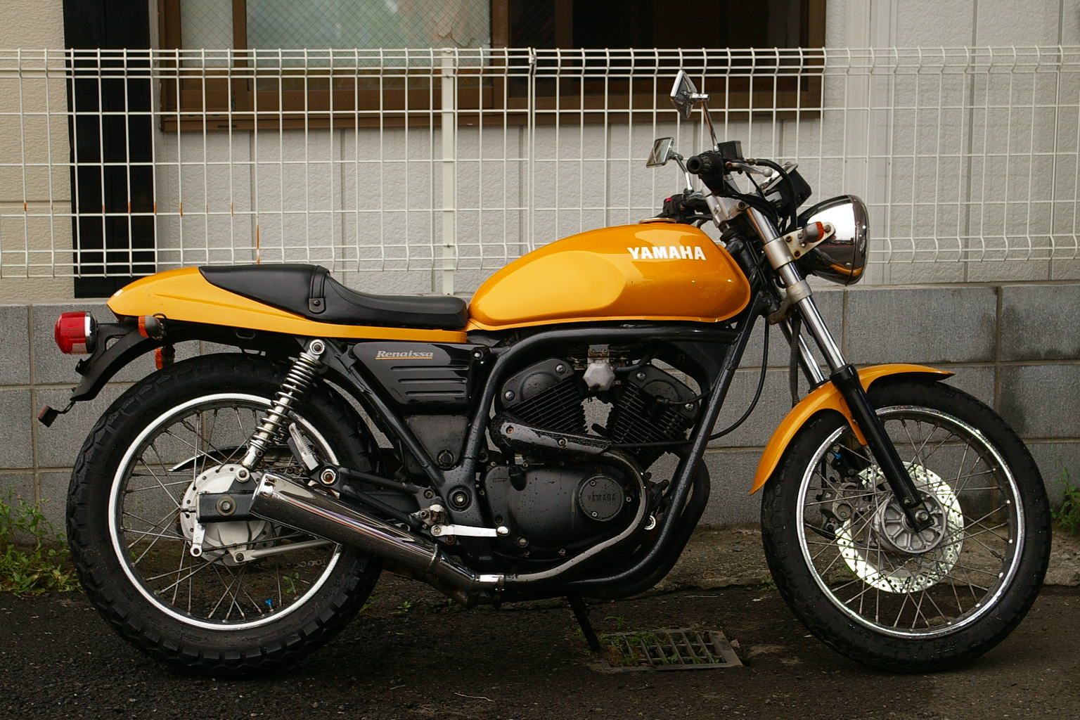 ルネッサの写真です